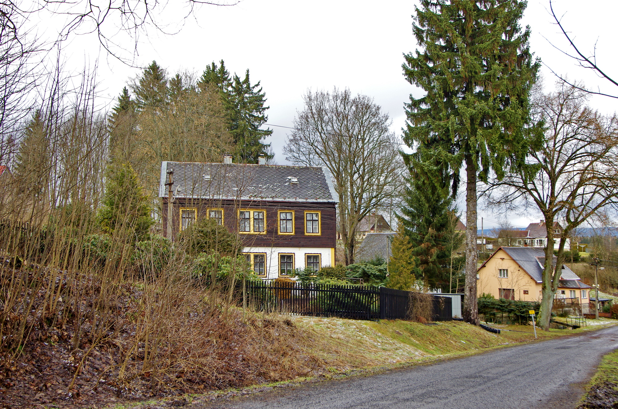 Loučná, součast obce Jindřichovice, Krušné hory, okres Sokolov